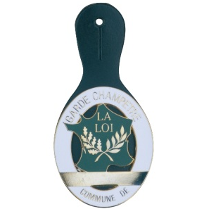 Pucelle garde champêtre porté sur l'uniforme, remplaçant la plaque